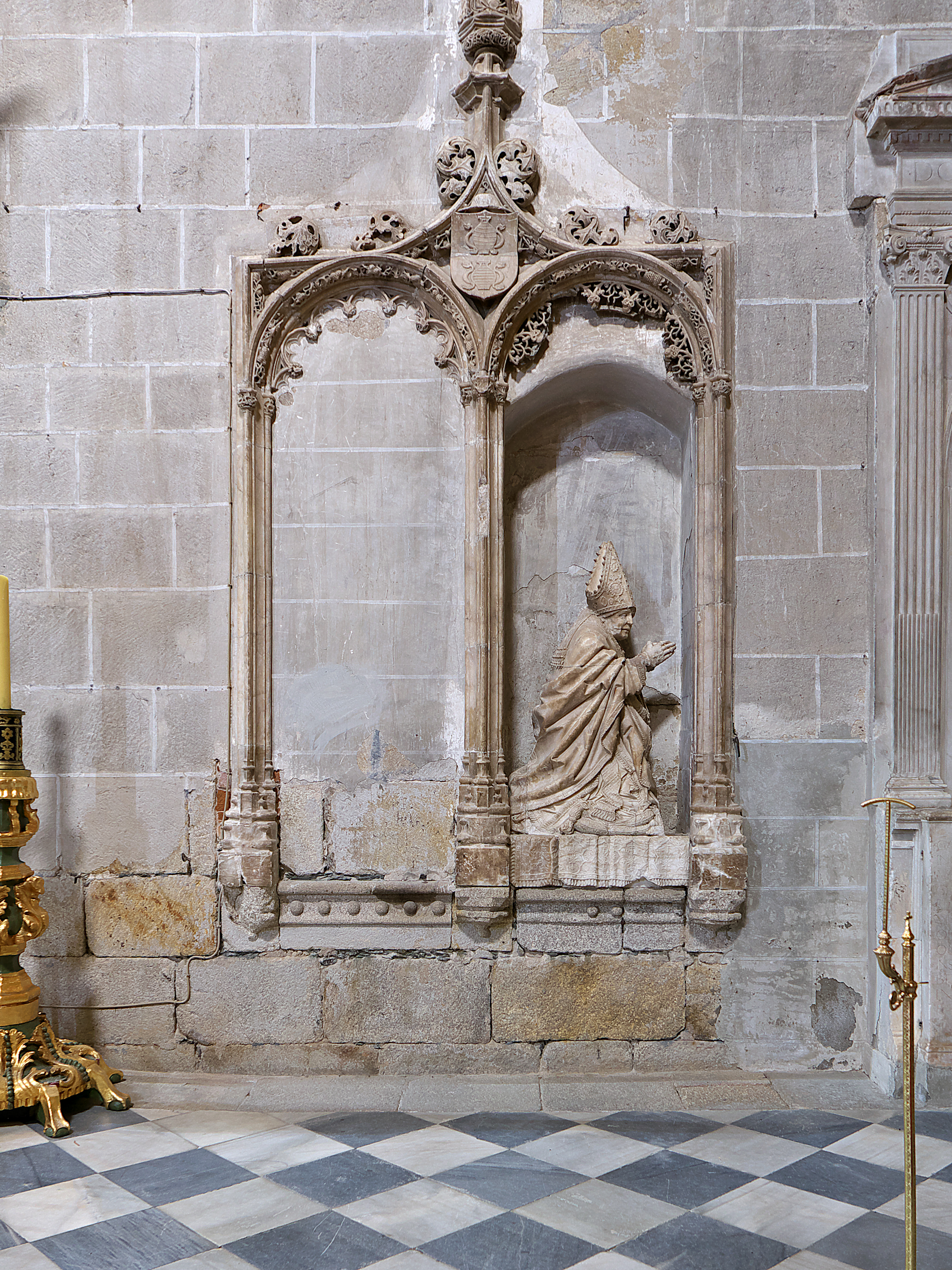 Figura orante del obispo Pedro Ximénez de Préxamo (†1495), obra de Diego Copín de Holanda. El marco gótico, de Gonzalo Arias y Martín de Solórzano (h 1495)